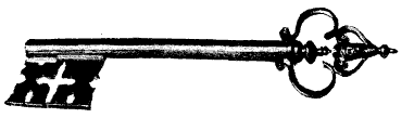 Riksnyckel